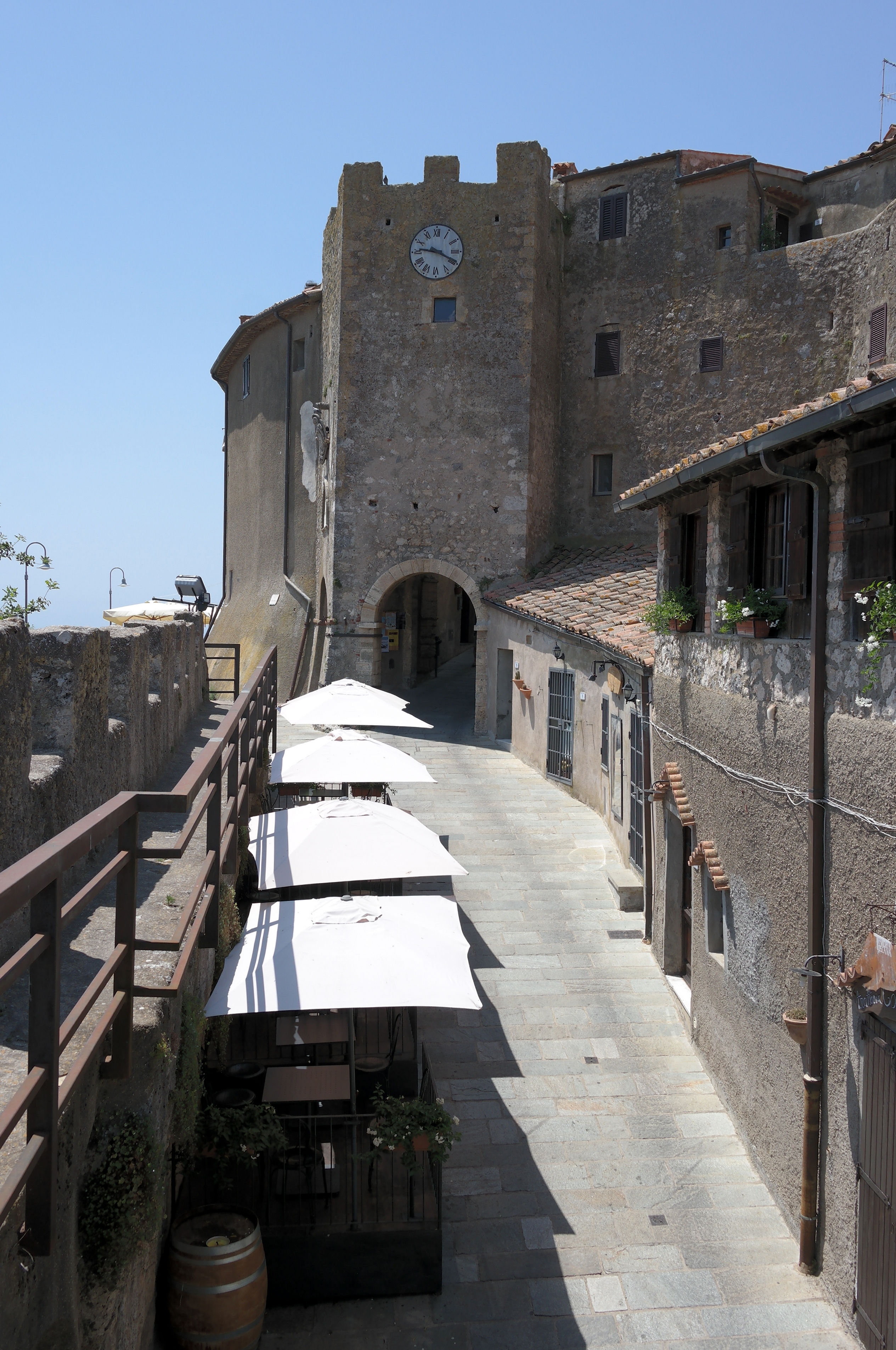 Torre Senese, all'ingresso di Capalbio